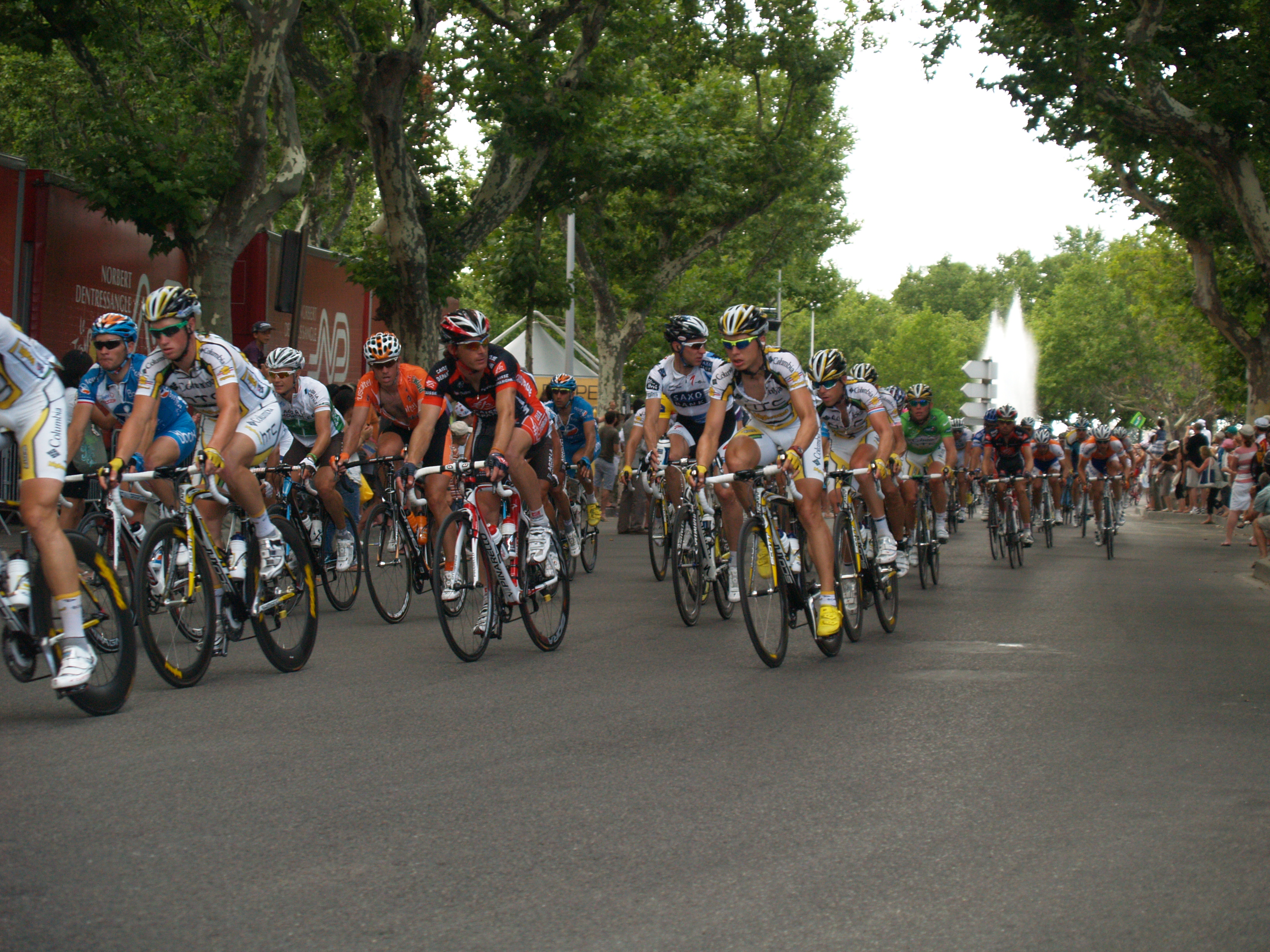 Peloton du Tour de France 2009 en Arles.